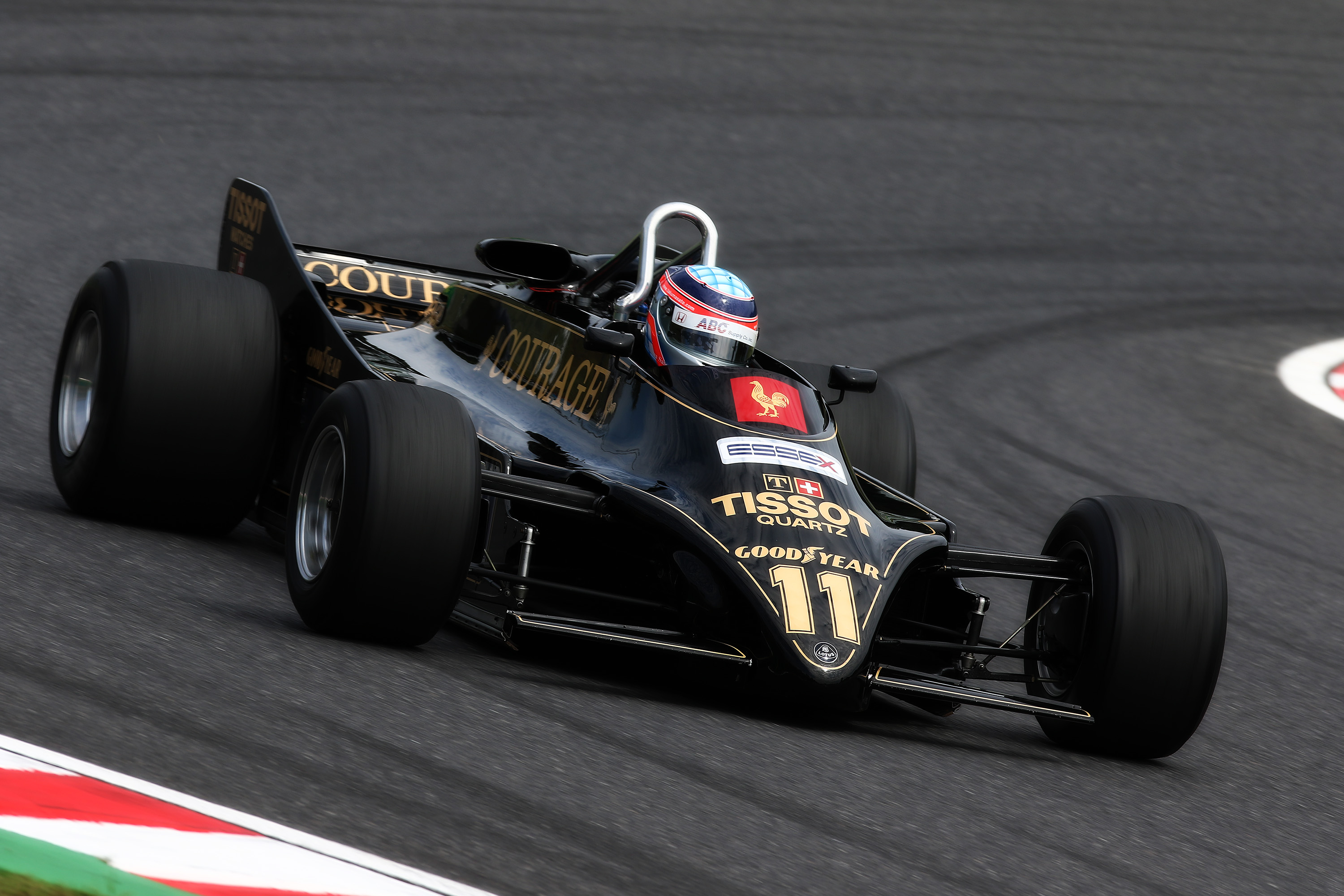 2015.9.27 F1 Rd.14 Suzuka Demonstration Run Driver: Takuma Sato レジェンドF1デモラン ロータス88B 佐藤 琢磨 [7D2_7058ks]